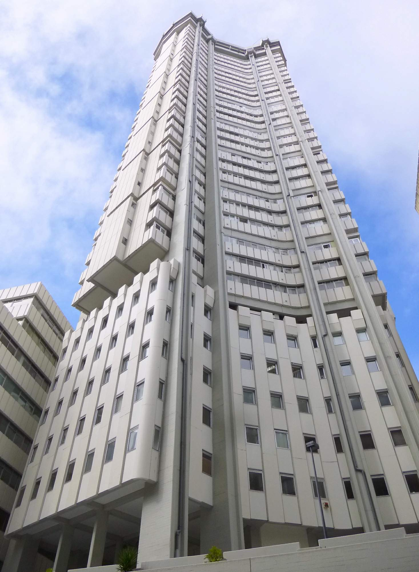 A Coruña - Torre Costa Rica (Torre Hercón)